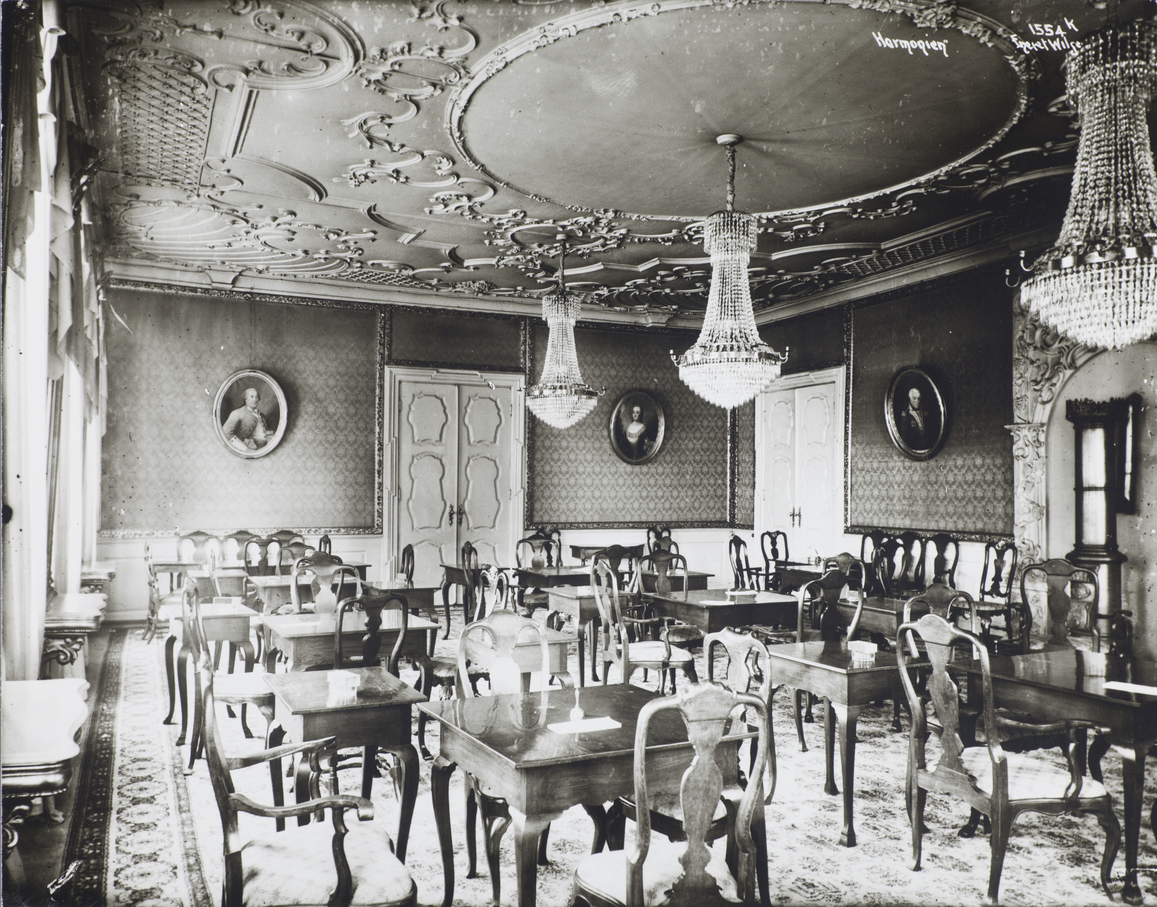 Børssalen/Festsalen i Harmonien, Munkegaten 22 i Trondheim. Stukkaturarbeidene er utført av J.C.C. Micaelsen. En kilde sier bildet er fra 1930-årene (P. Christensen: Til anstændig Fornøielse. Bok), mens en annen tidfester det til 1919 ( Ut fra dokumenter fra 1930-årene, er dette fotografiet fra den tiden, men før rehabiliteringen i 1939. Da skal elektriske ledninger i himlingen ha blitt lagt i "mellomloftet", slik at de ikke gikk over/gjennom stukkaturutsmykningen. Riksantikvaren RAKV-S-6224-D-Db-Db16-0005-0359-0002.pdf